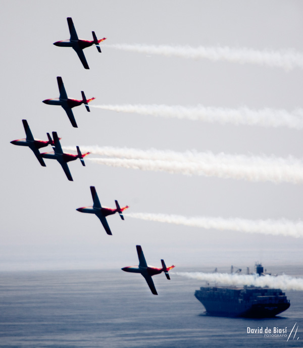 Patrulla Águila en el Festival Aéreo de Málaga de 2009.